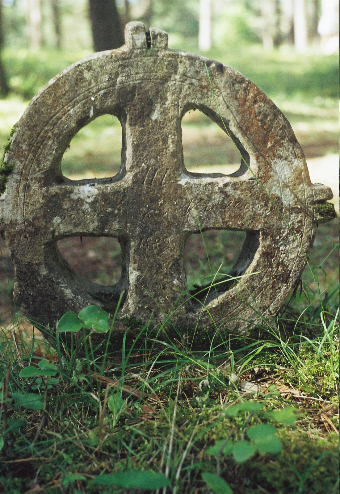 Vormsi kalmistul asuv rist.